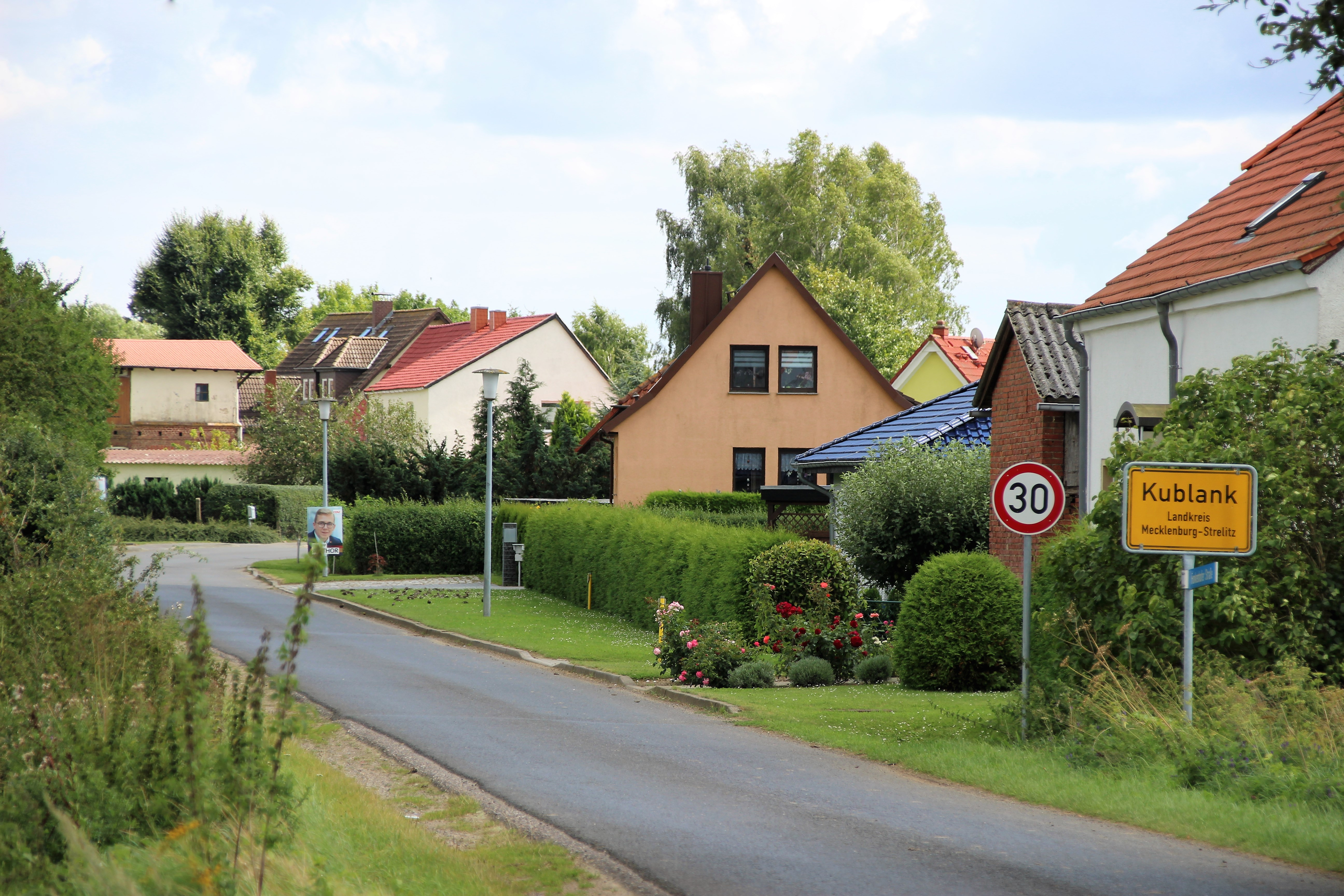 Nordwestlicher Ortseingang